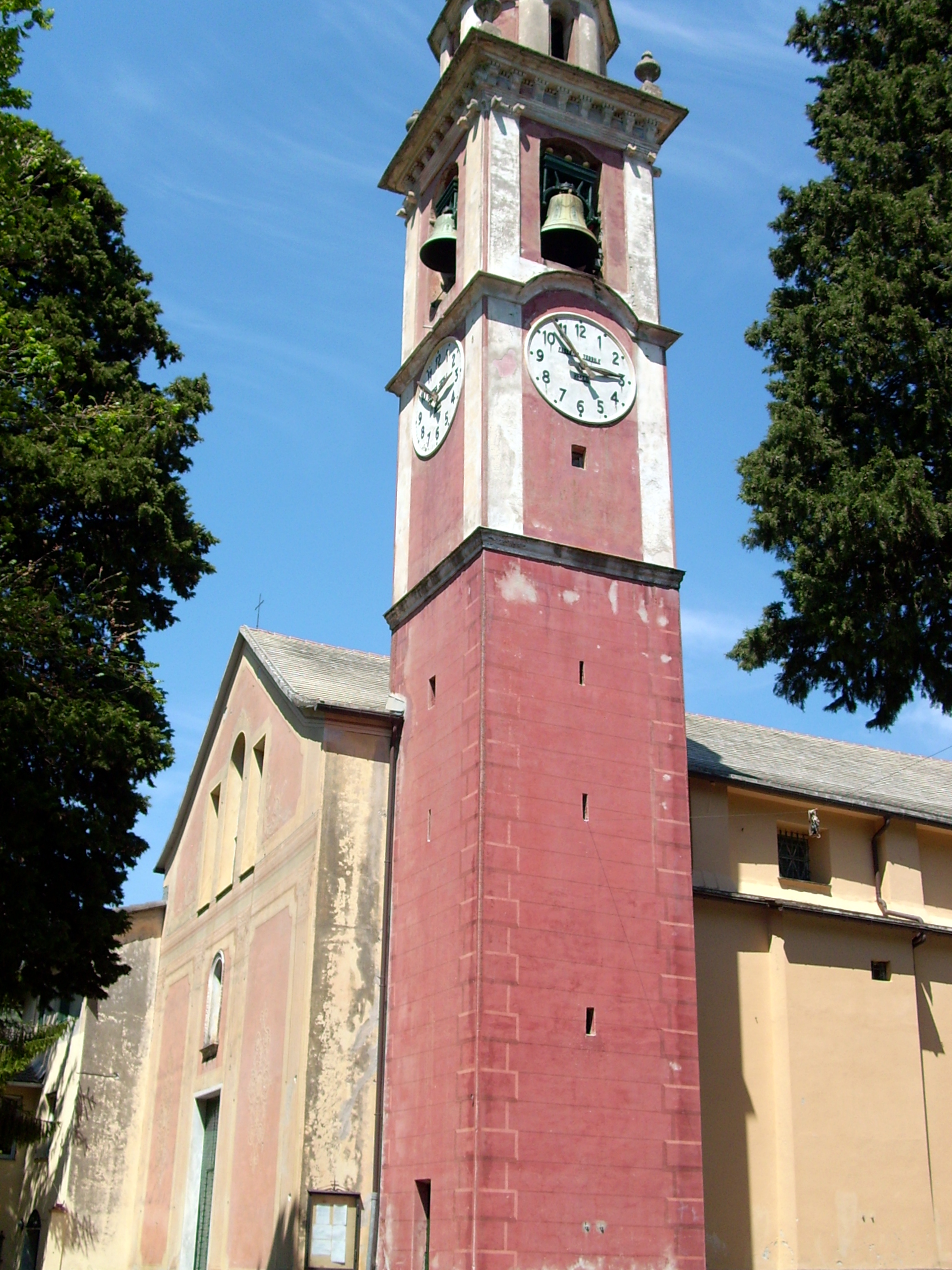 Chiesa di San Pietro apostolo ad Avegno, Liguria, Italia